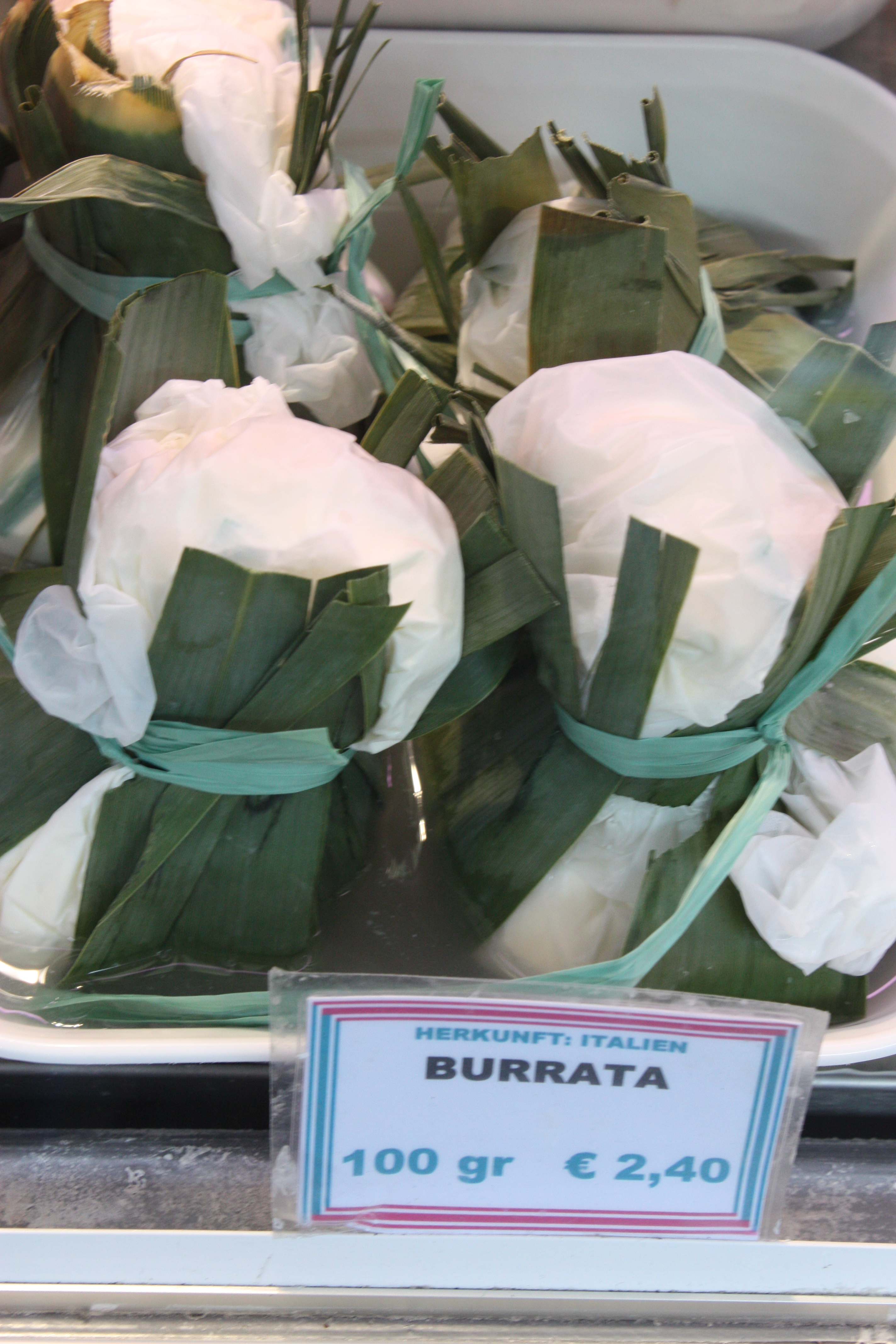 Naschmarkt, Vienna, Wien; Burrata cheese